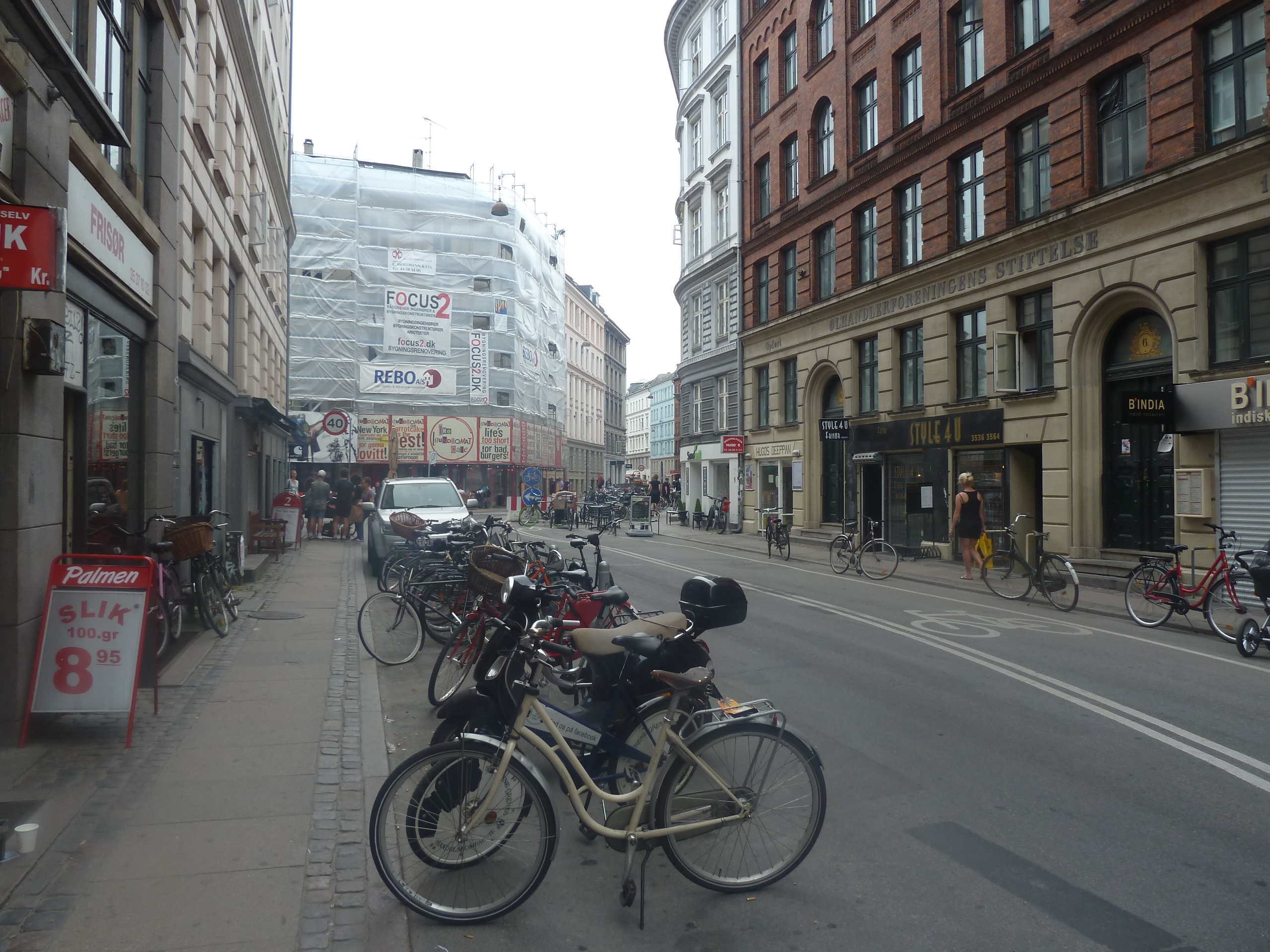 The street Elmegade in Copenhagen.